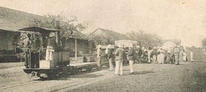 Diego Suarez - Chemin de fer d'Antsirane au Cap d'Ambre